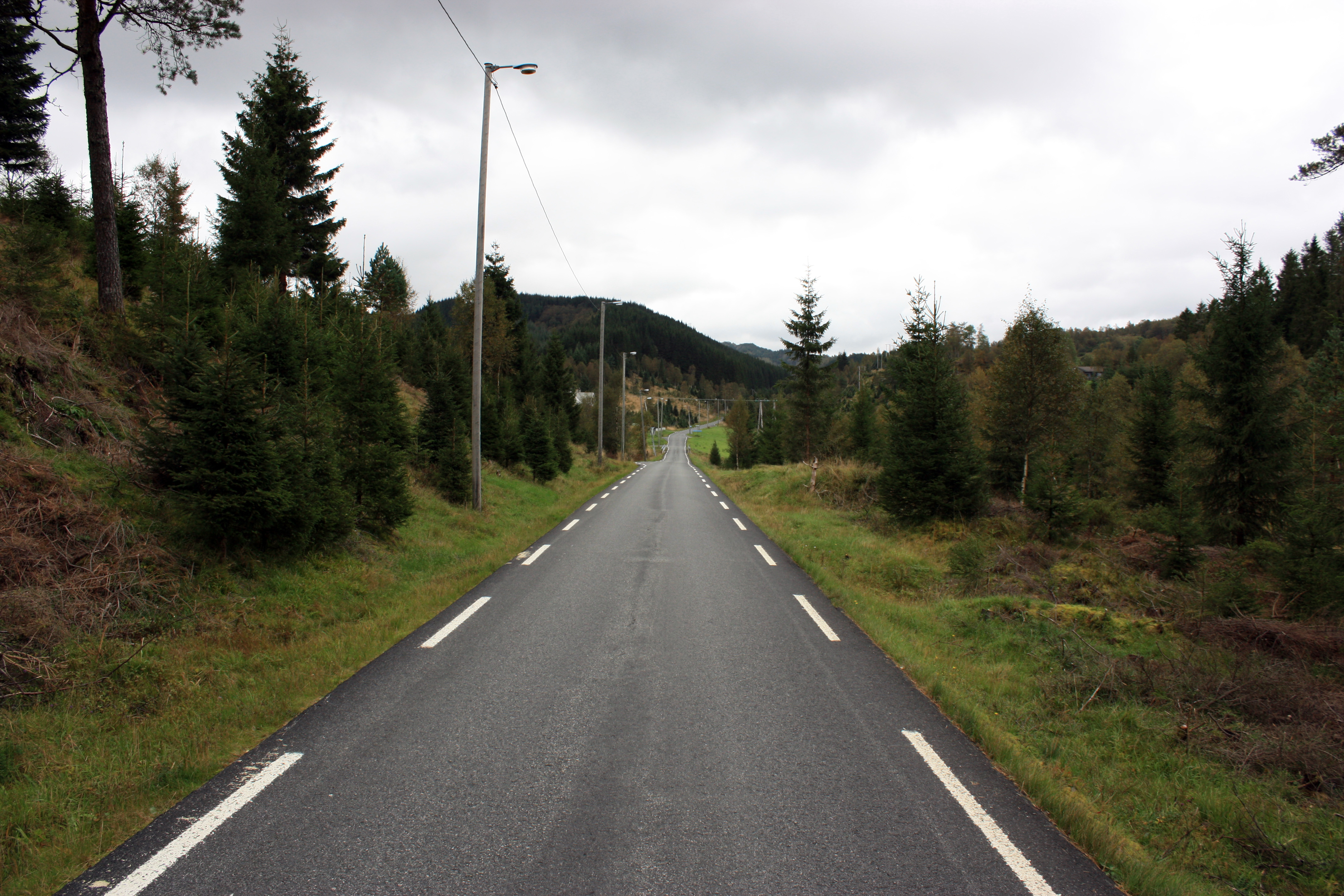 Bontveitvegen, Fana, Bergen.